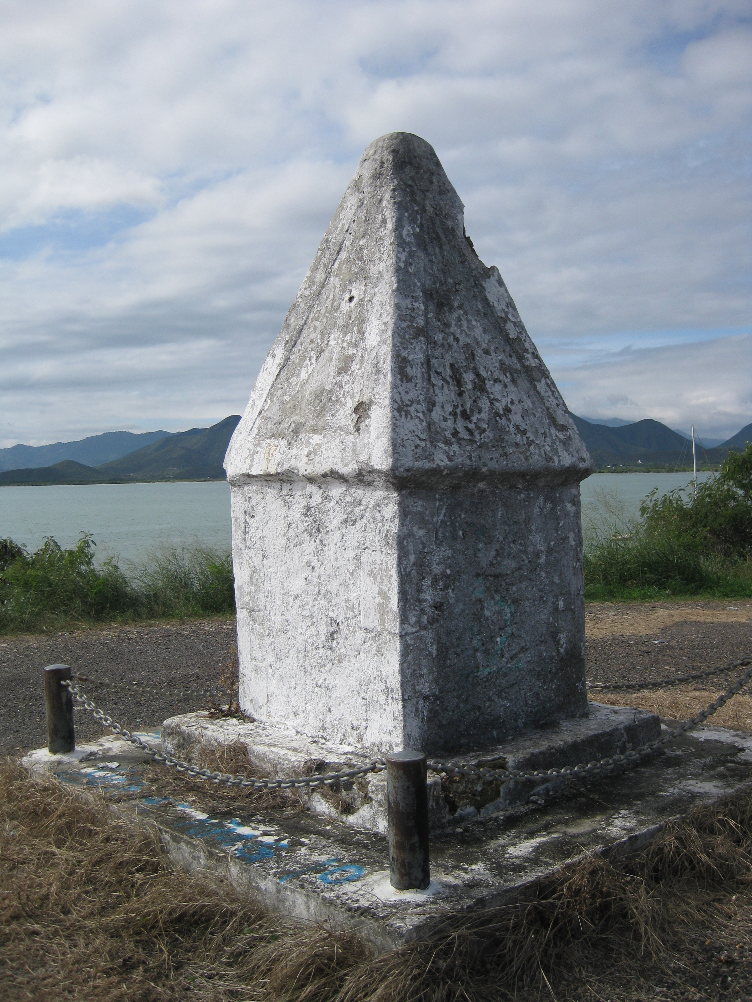 Monument commémoratif du massacre des équipages du Secret et de la Reine-des-Iles en juillet-août 1865 à Gatope